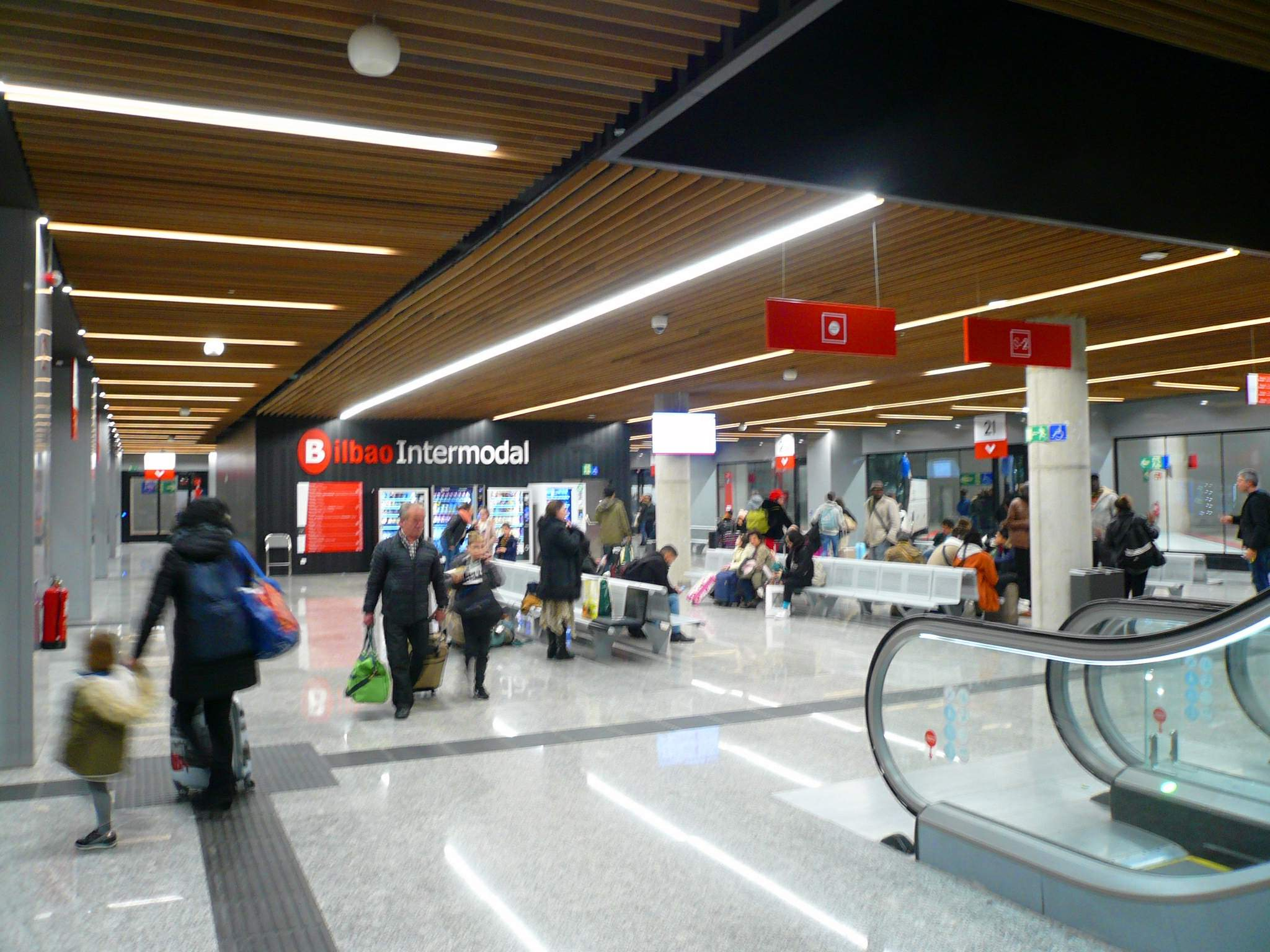 Intermodal de Bilbao, fotografiada el 30 de diciciembre de 2019